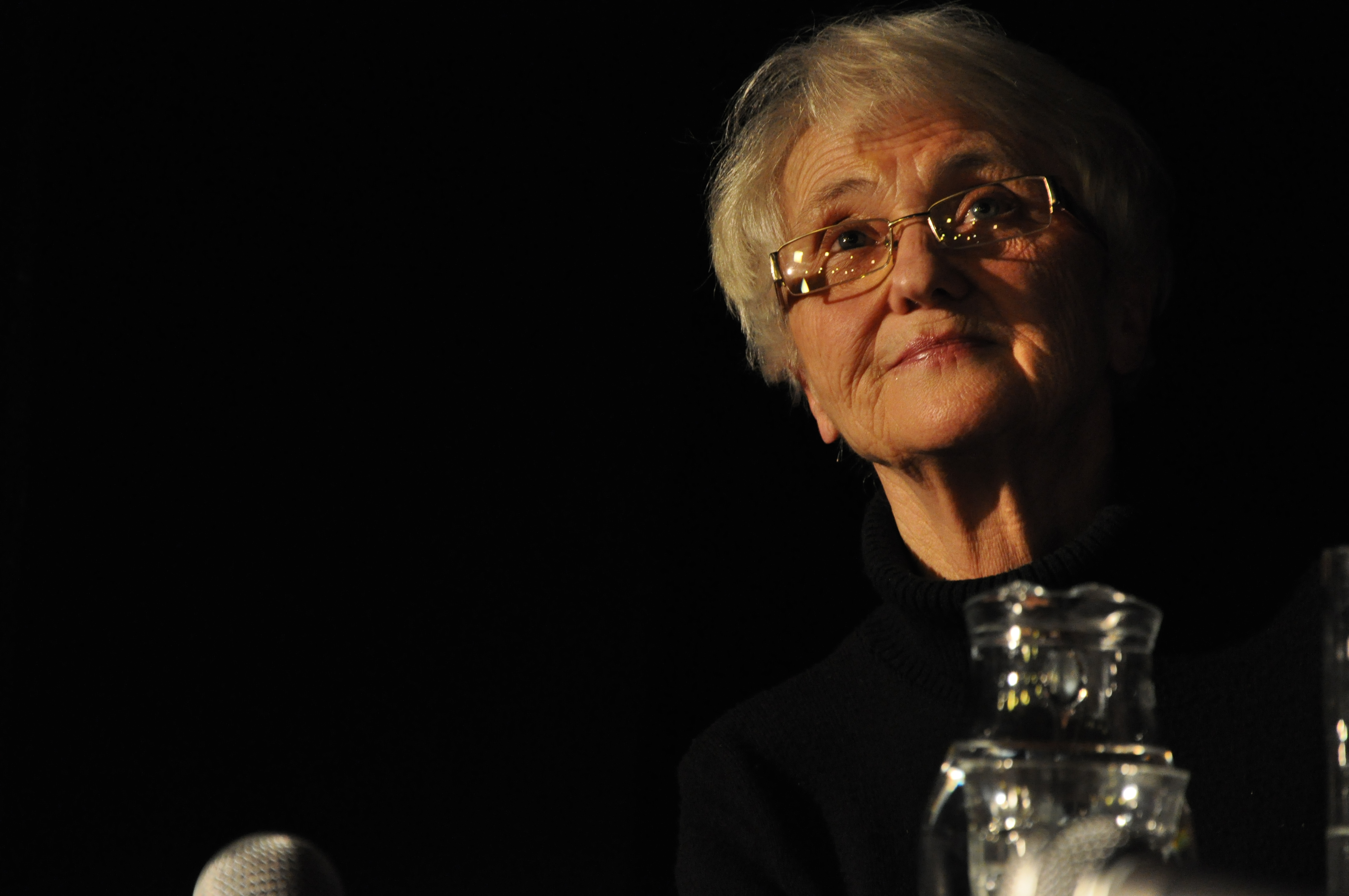 Zdena Mašínová při besedě moderované Michalem Doleželem. Festival Moje 20. století, Brno, 15. listopadu 2012.